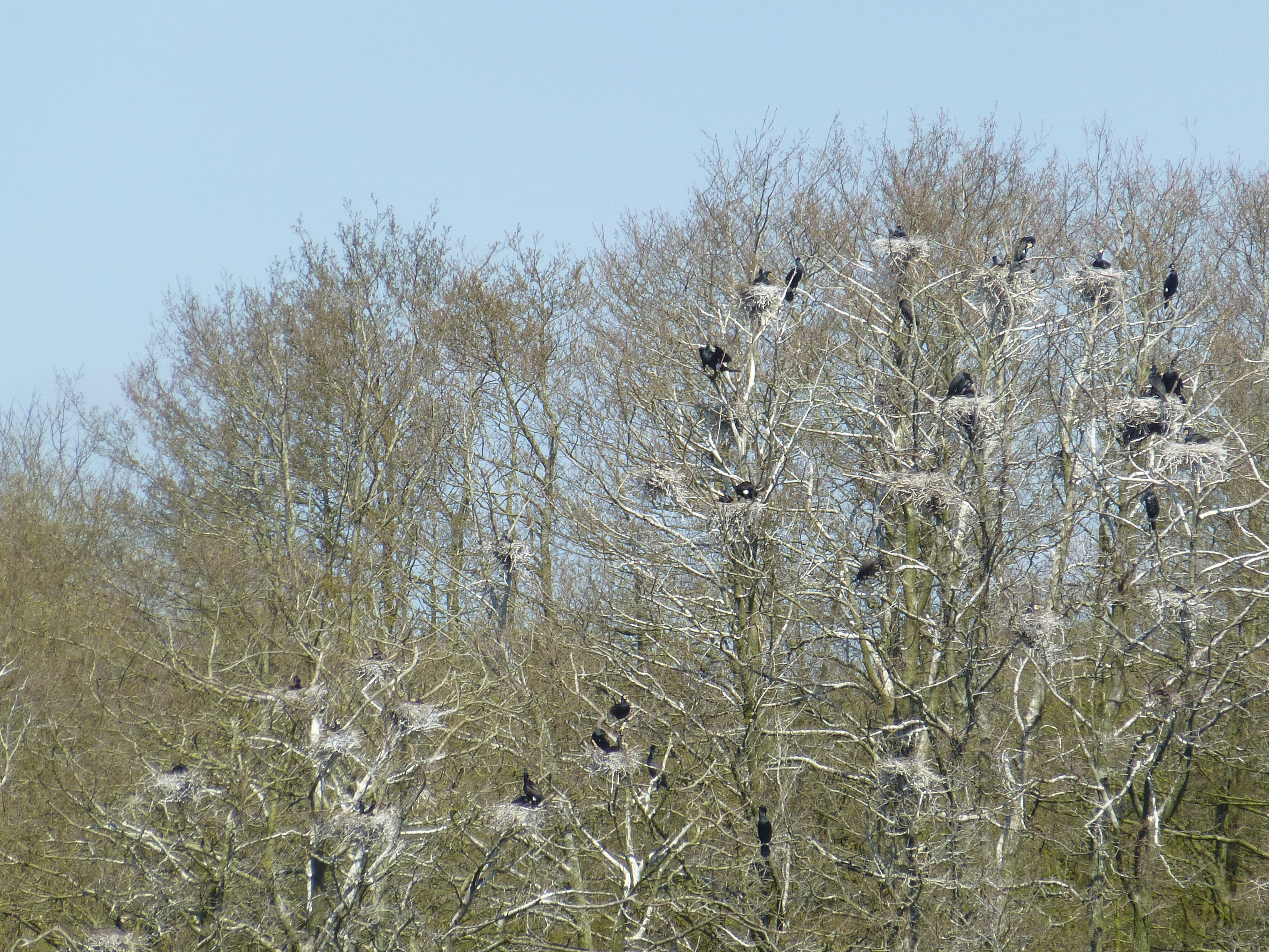 Skarvkoloni ved Hald Sø syd for Viborg